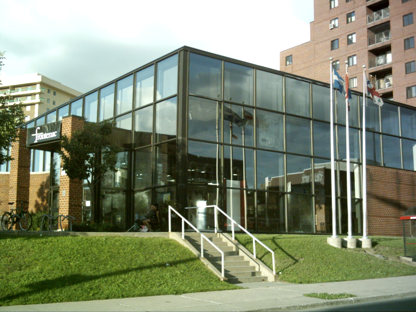 La Maison de la culture Frontenac